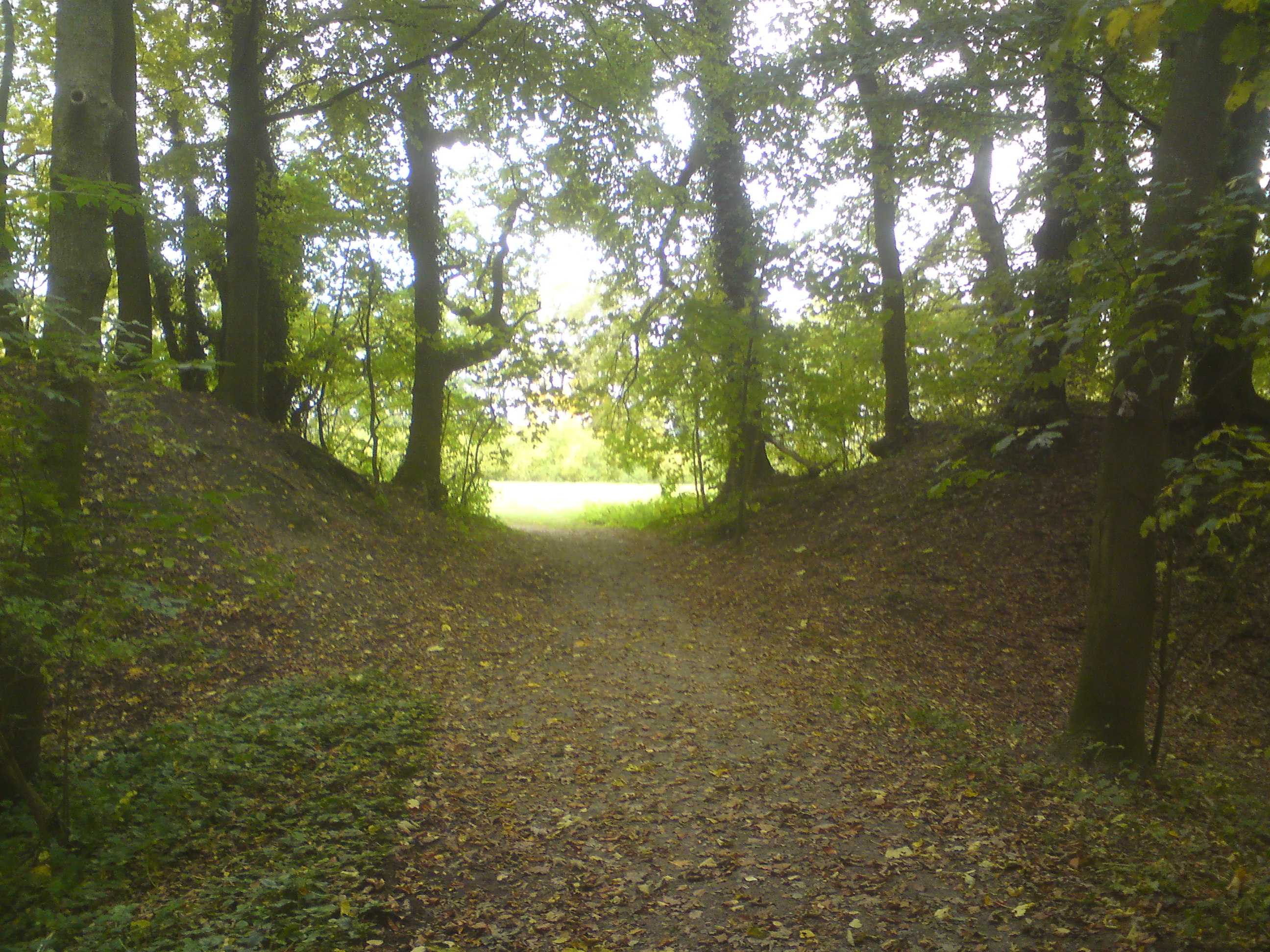 Burgwall Schnakenbek (Ertheneburg): Walldurchlass von Norden